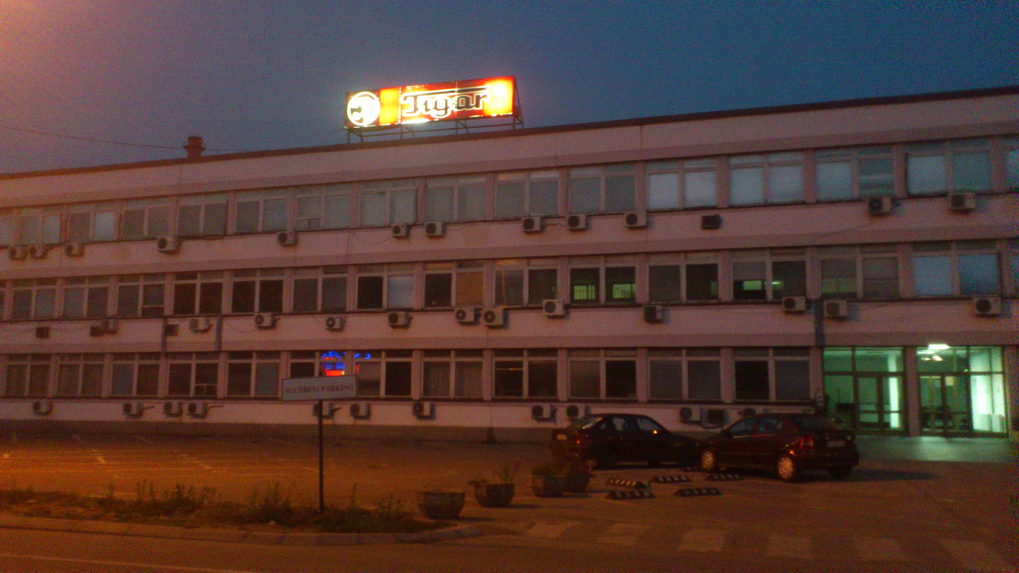 Tigar Pirot